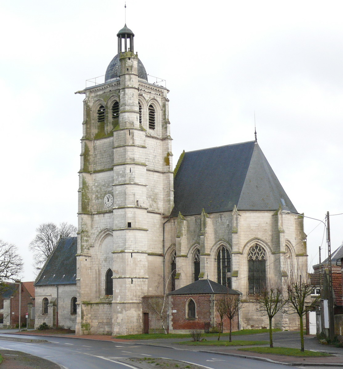 Église Esquennoy (Oise)